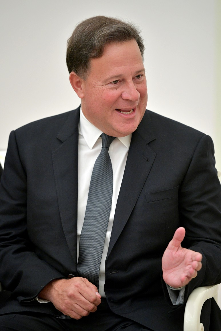 Президент Панамы Хуан Карлос Варела во время встречи с Президентом России Владимиром Путиным